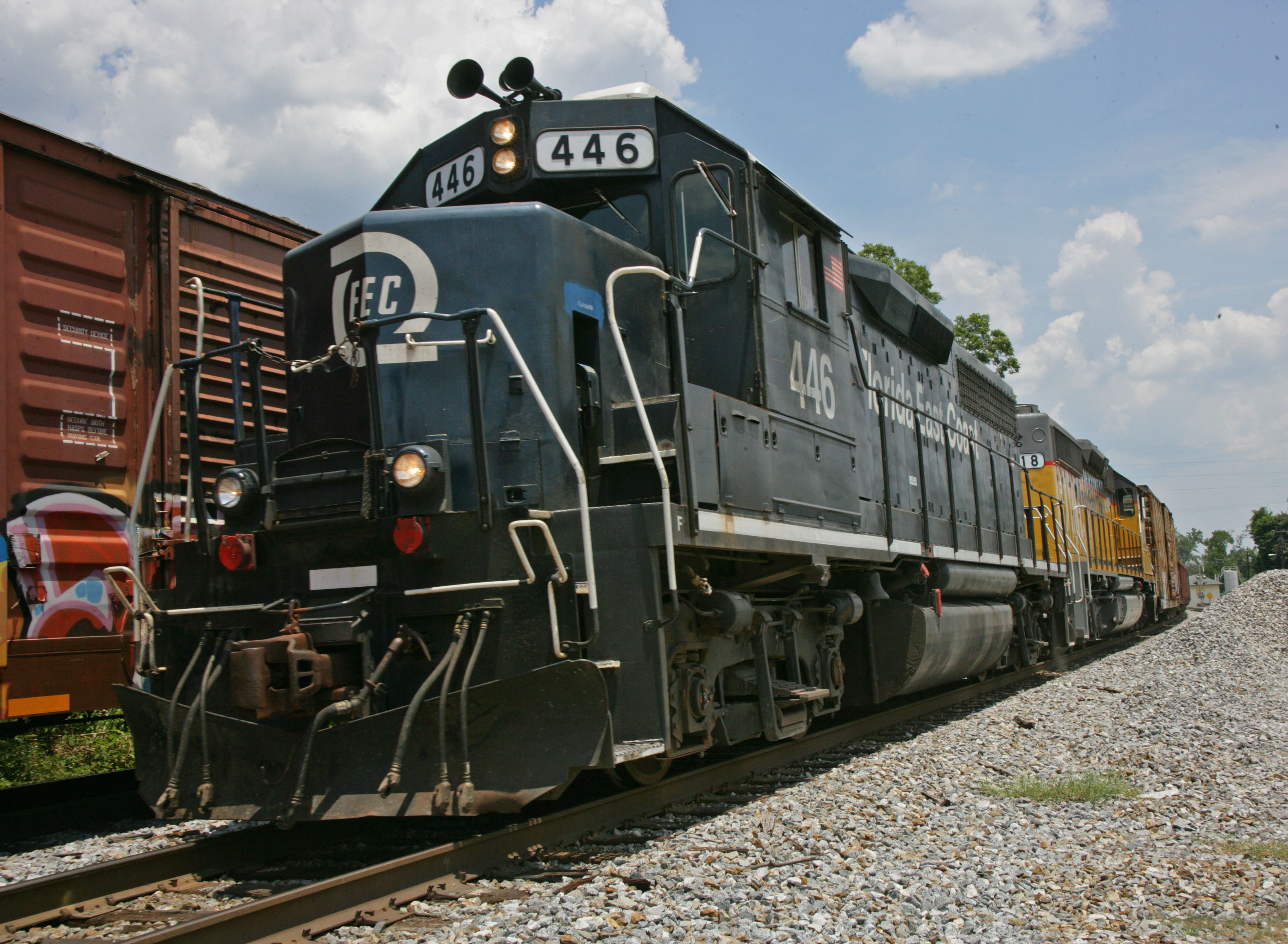 FEC 446